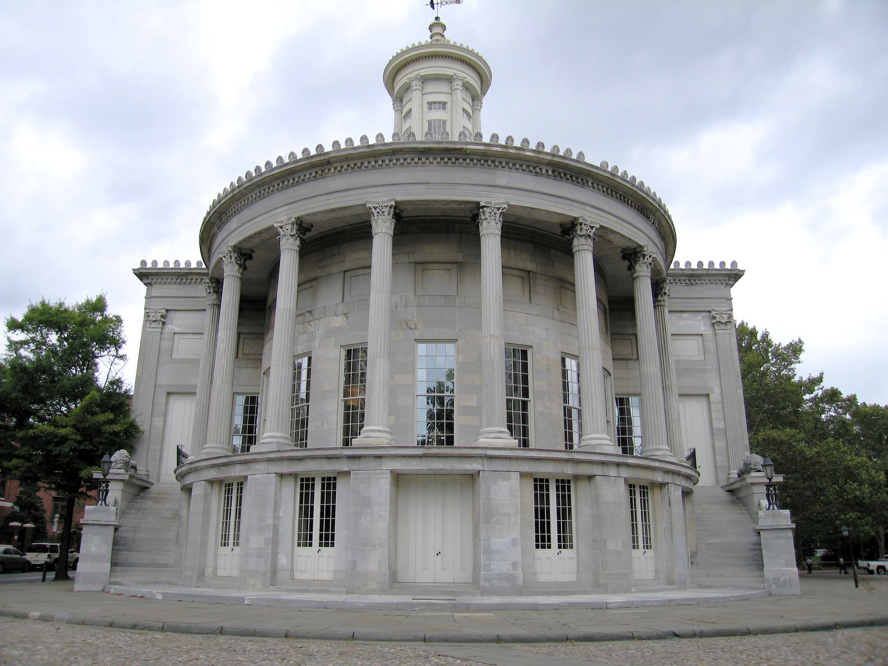 Merchants' Exchange, Philadelphia, USAMerchants' Exchange